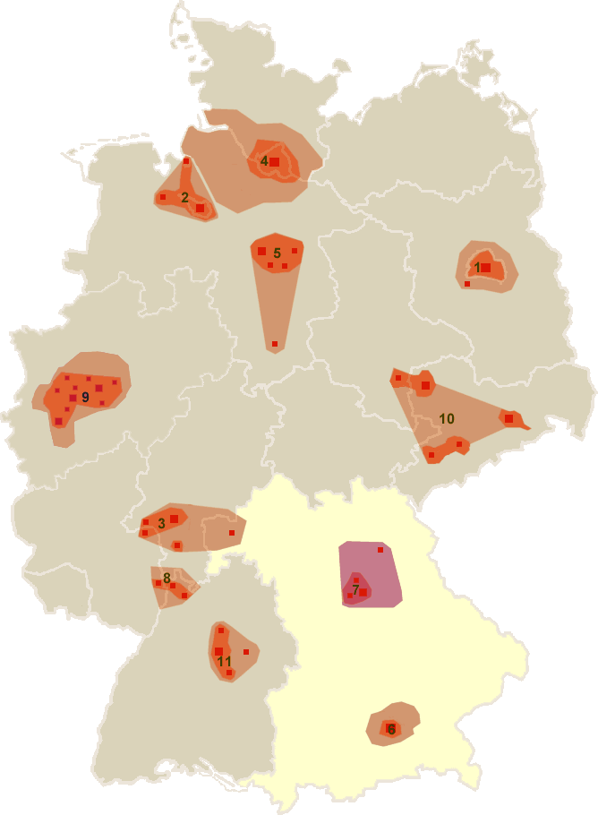 basierend auf Bild:Deutschland_Metropolregionen.pngKarte der Metropolregionen in Deutschland: *#Berlin/Brandenburg *#Bremen/Oldenburg *#Frankfurt/Rhein-Main *#Hamburg *#Hannover *#München *#Nürnberg *#Rhein-Neckar-Dreieck *#Rhein-Ruhr *#Sachsendreieck *#Stuttgart *Anmerkung: Die räumliche Ausprägung und Abgrenzung einiger Metropolregionen (insbesondere München) kann nicht ganz genau festgestellt werden. Sollten genauere Informationen vorliegen, bitte ich darum, diese in das Bild einzuarbeiten.